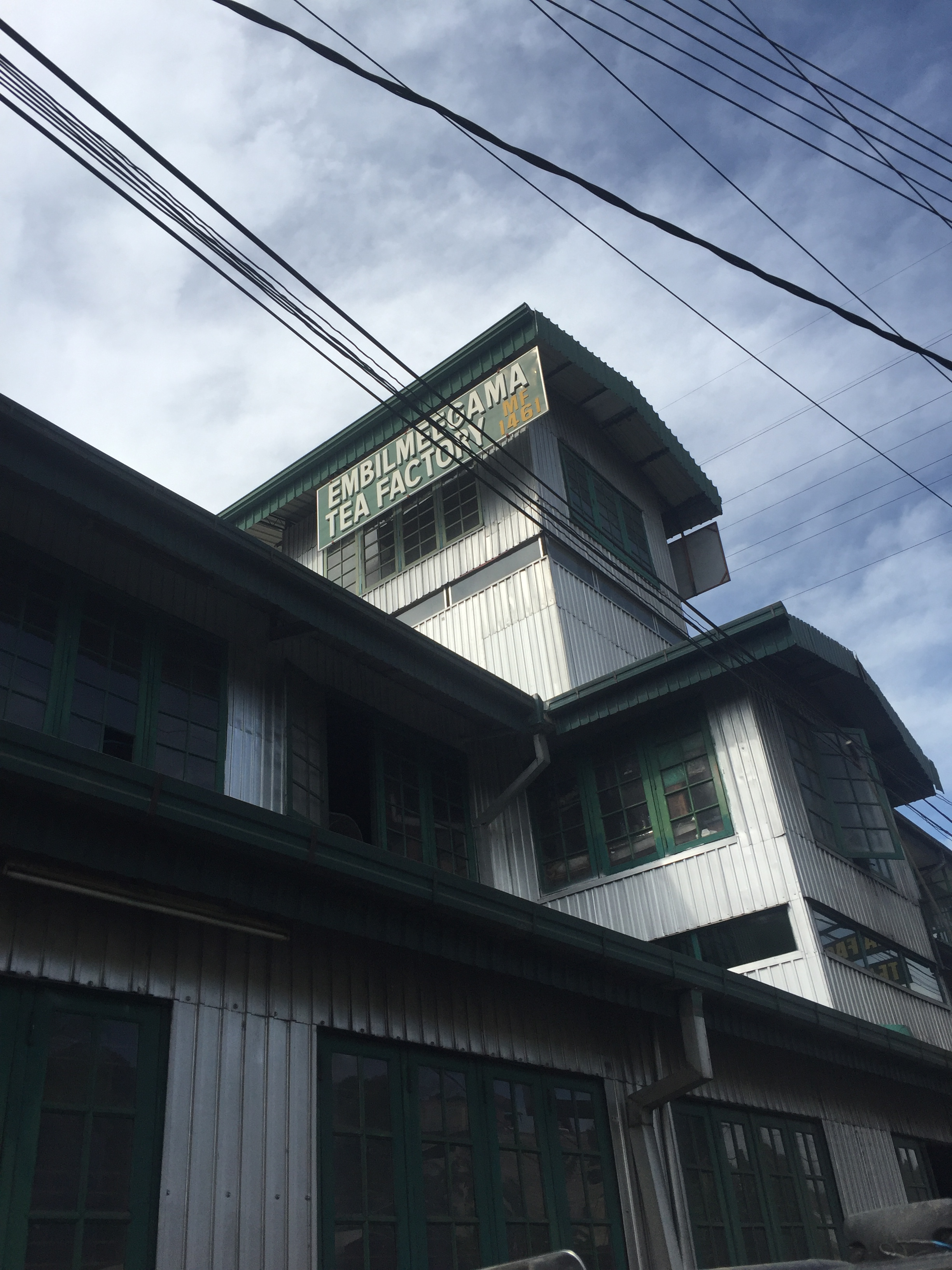 Embilmeegame, Sri Lanka